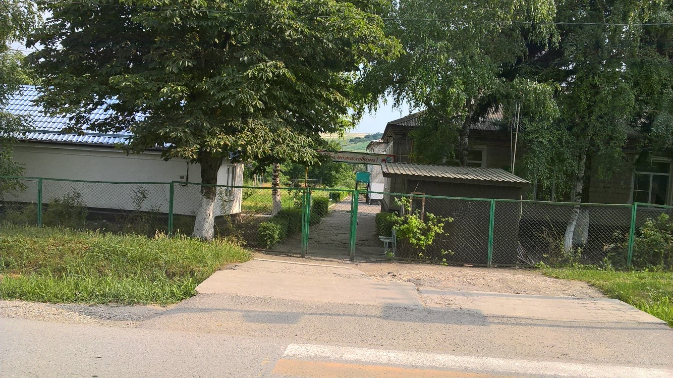 Школа №28 село Садовое, Предгорный район, Ставропольский край.